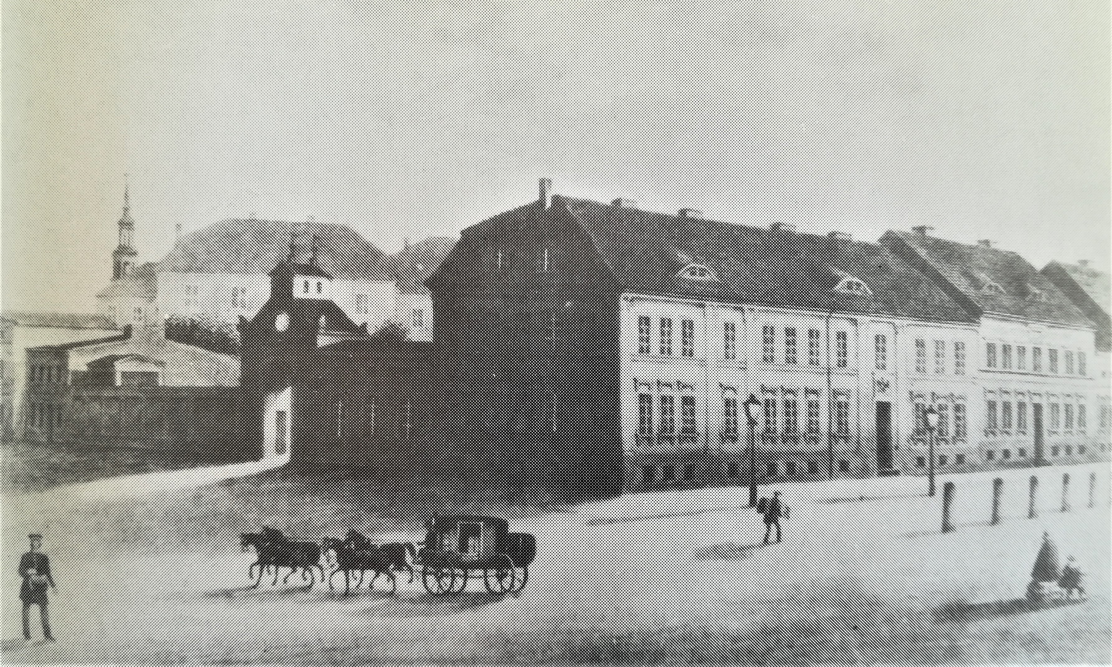 Gmach poczty przy Alejach Marcinkowskiego w Poznaniu róg ul. 23 Lutego. 1840 r.